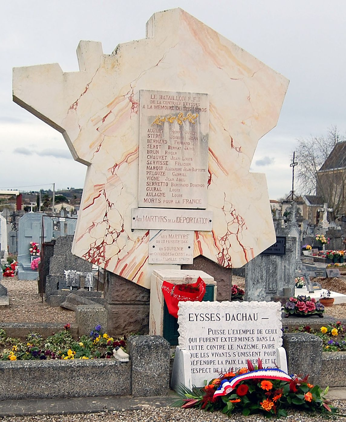 Monument érigé par l'Amicale d'Eysses au cimetière Sainte-Catherine de Villeneuve-sur-Lot où ont été enterrés les douze fusillés d'Eysses